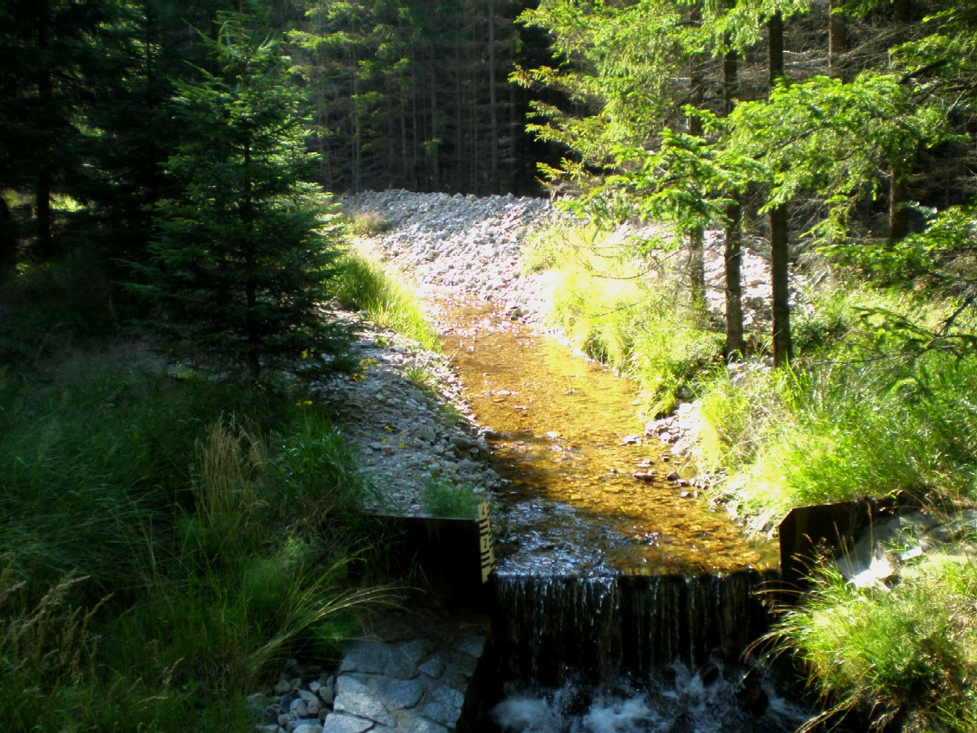 Pilský potok nad stejnojmennou nádrží protéká zanikajícím rašeliništěm